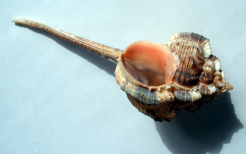 Haustellum haustellum (synonym : Murex haustellum)